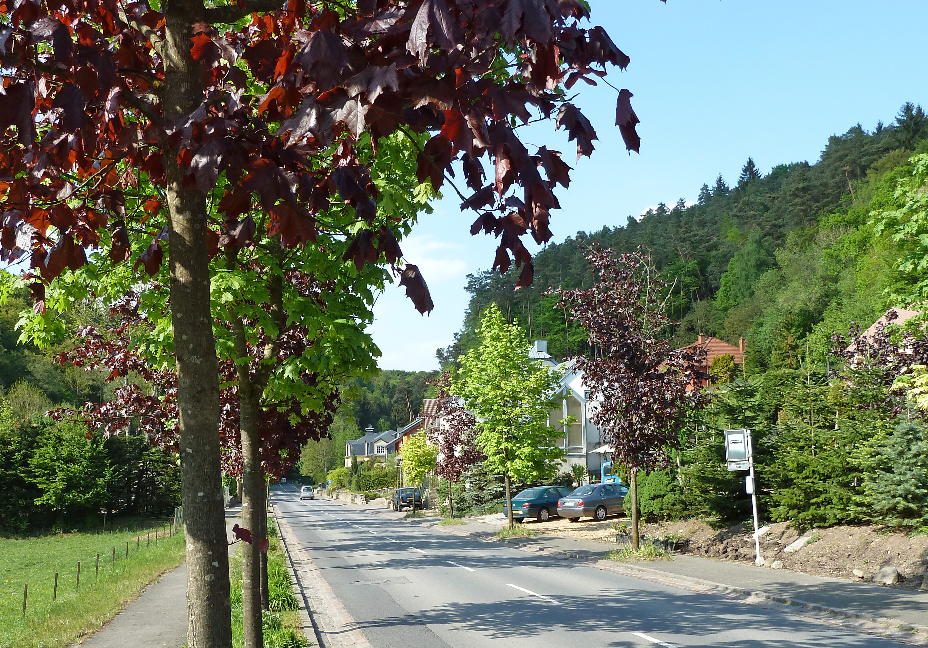 Sujet: Am Blummendall Auteur: User:Johnny Chicago Source: eege Foto